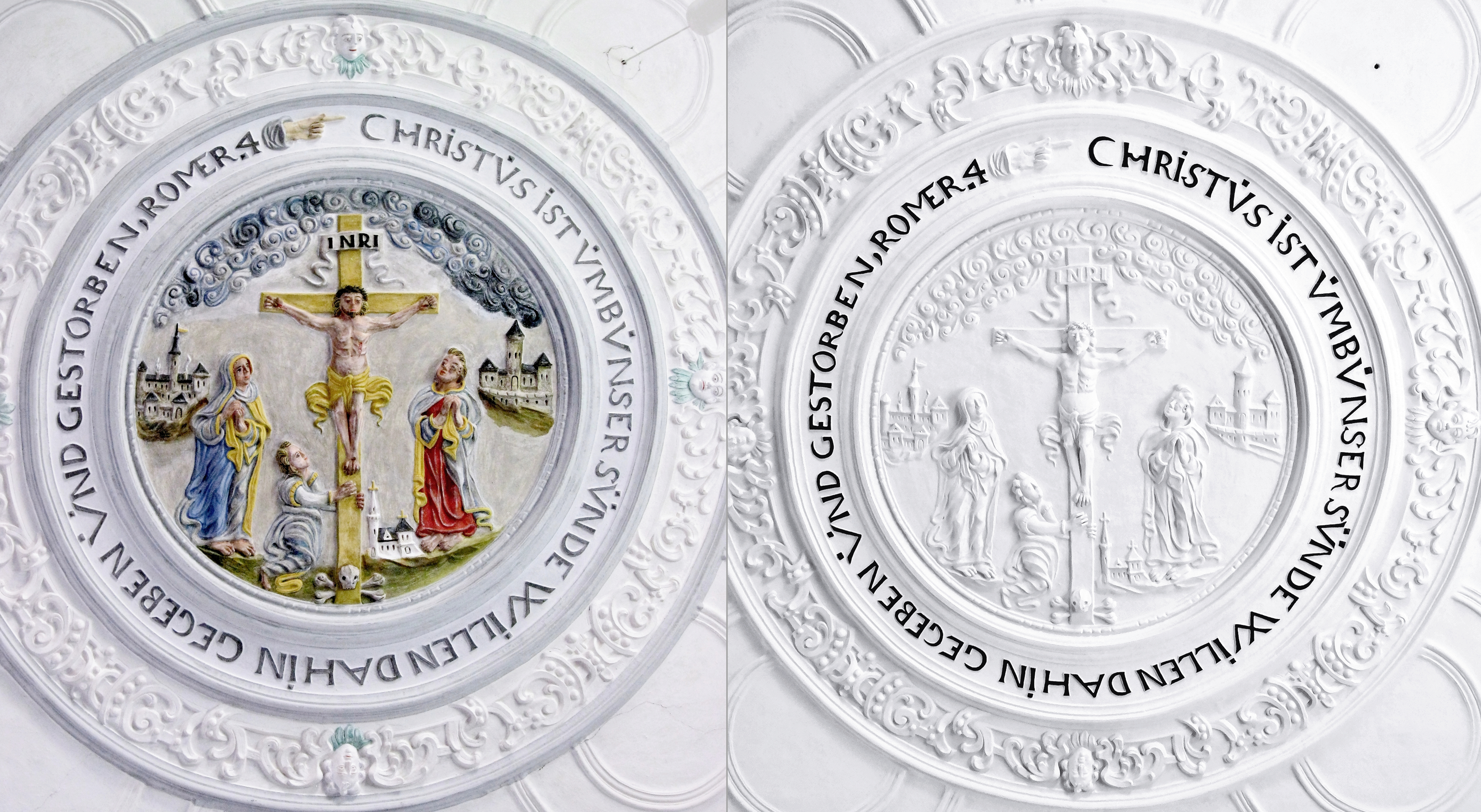 Kreuzigung an der Stuckdecke der Evangelischen Kirche in Holzheim, Pohlheim, Hessen, Vergleich 2012 und 2014